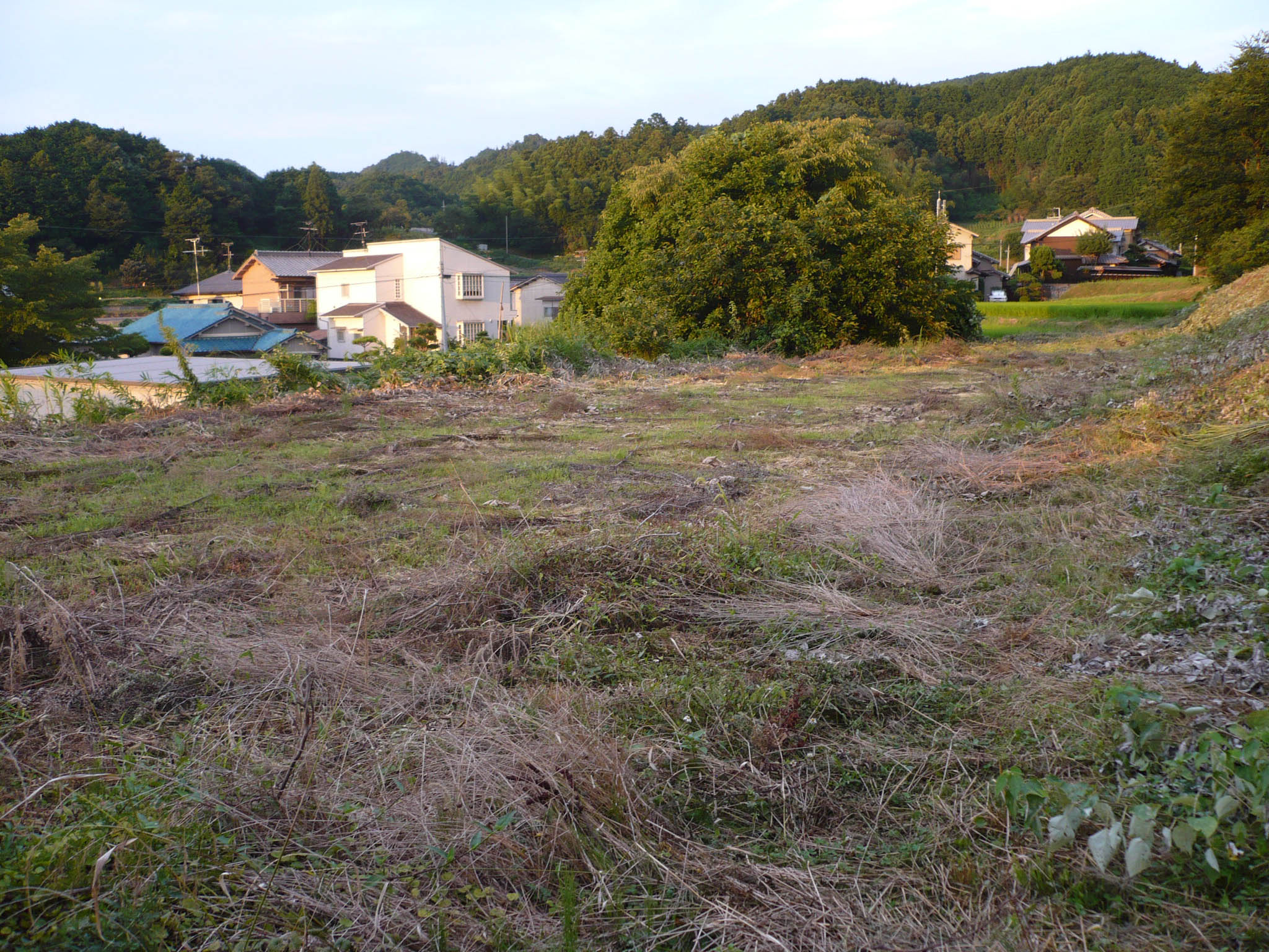 下屋敷跡